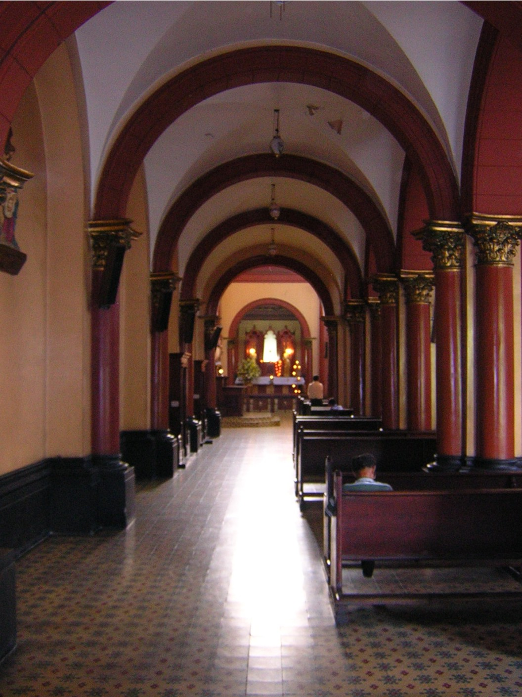 Iglesia de San Antonio. Medellín, Colombia.